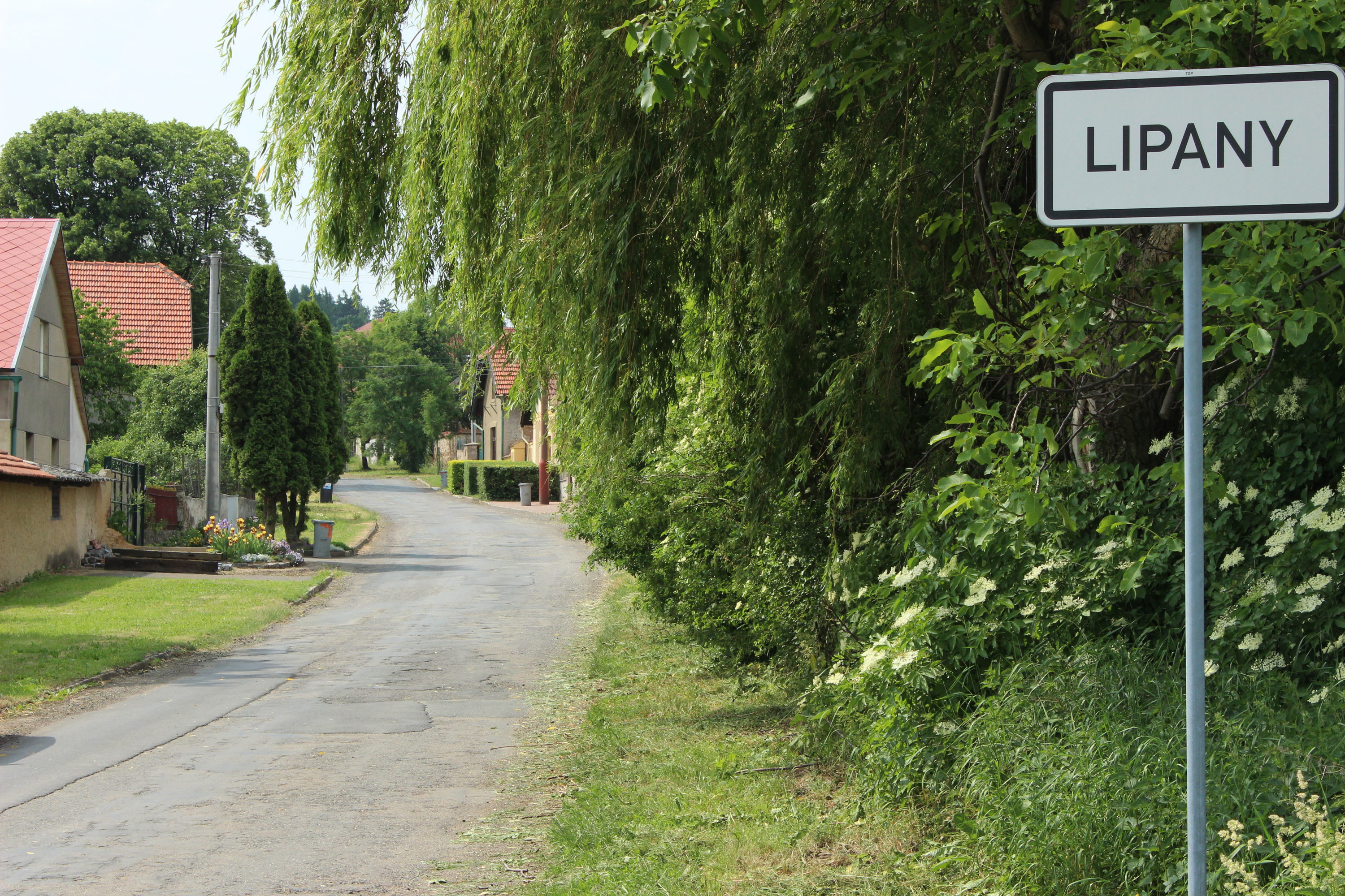 Lipany (Vitice), vjezd do vesnice ze severu od kolínské cesty.